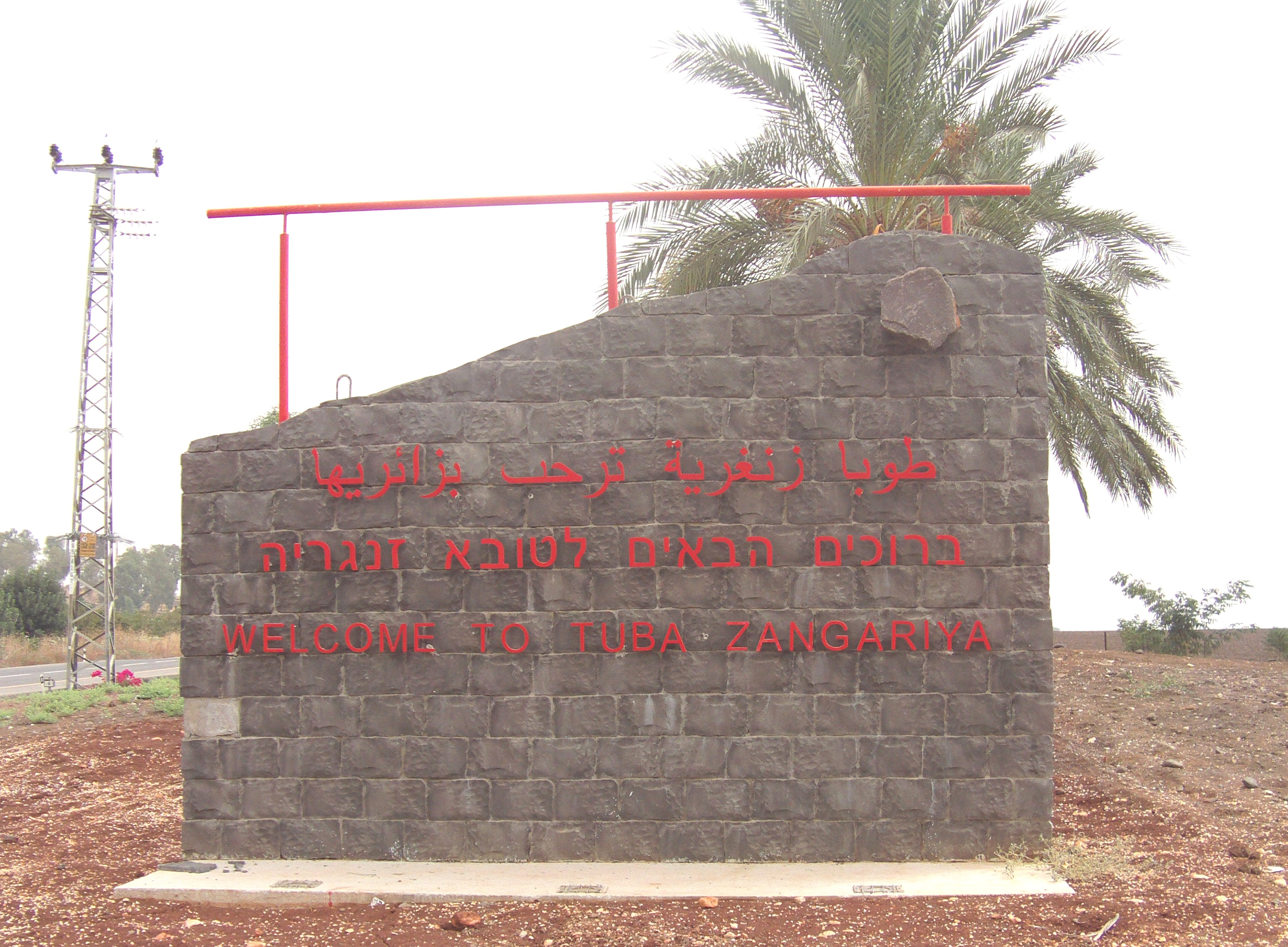 טובא זנגריה כפר בדווי בגליל הכניסה ליישוב